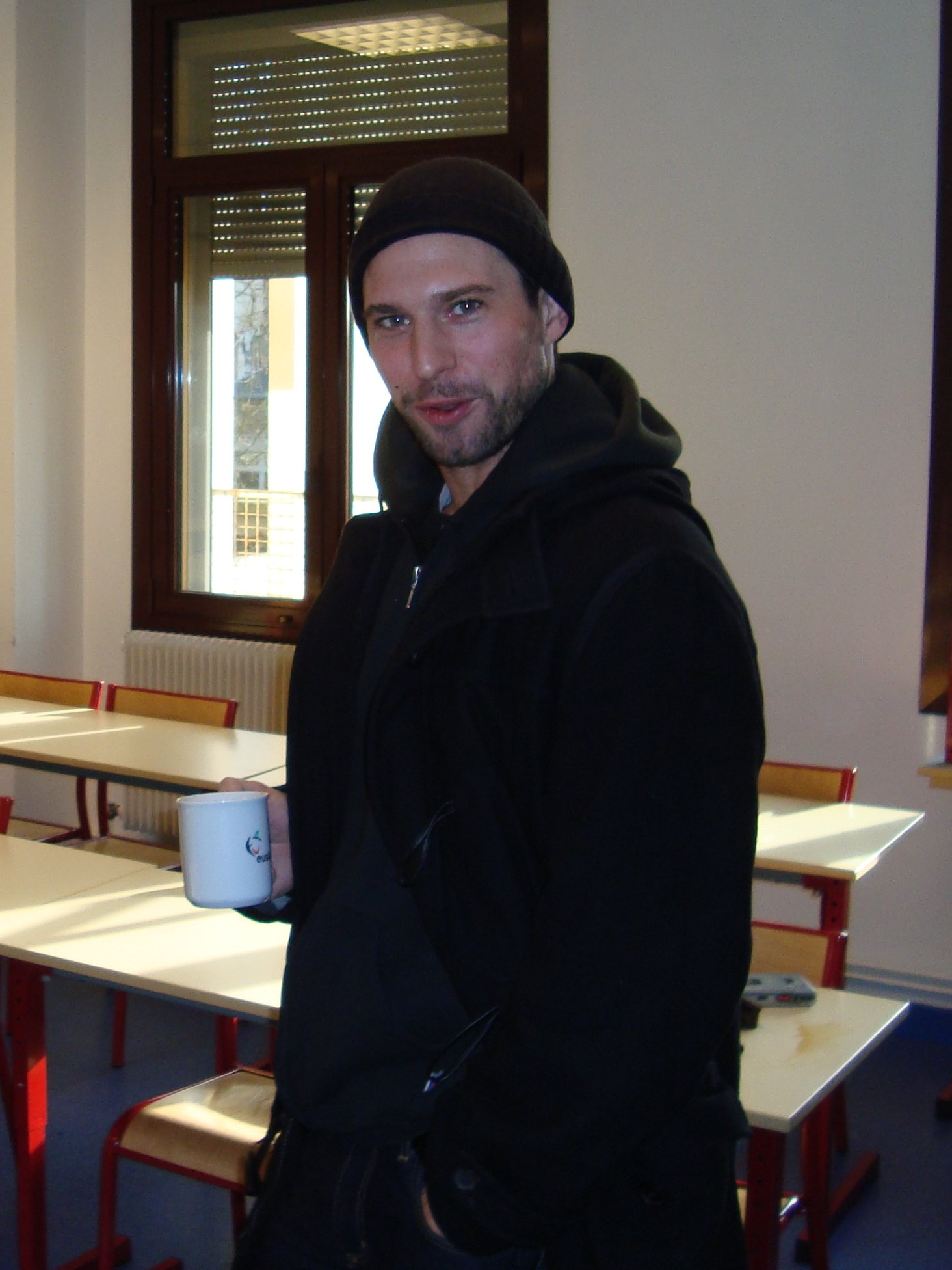 Florian Gaag au lycée Sévigné de Charleville-Mézières le 19 février 2009